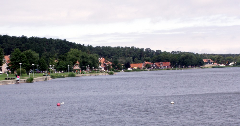 Joudkrantė, Lithuania. Vaizdas nuo marių